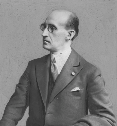 Князь Ян Токаржевський-Карашевич — український політичний і дипломатичний діяч, історик-геральдист.